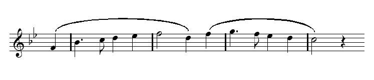 Legato notes